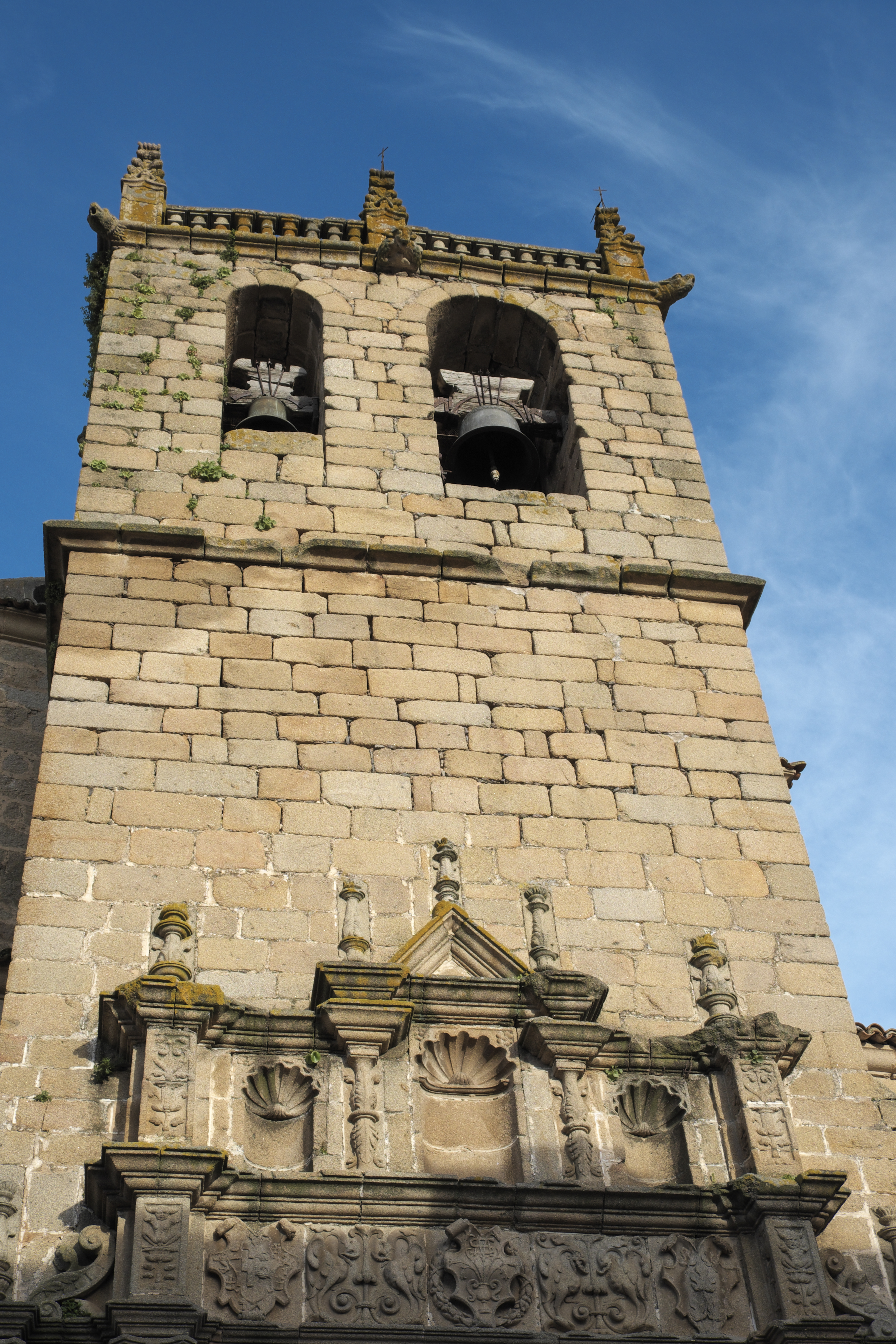 Kirche Nuestra Señora de la Asunción in Oropesa in der Provinz Toledo (Kastilien-La Mancha/Spanien), Glockenturm